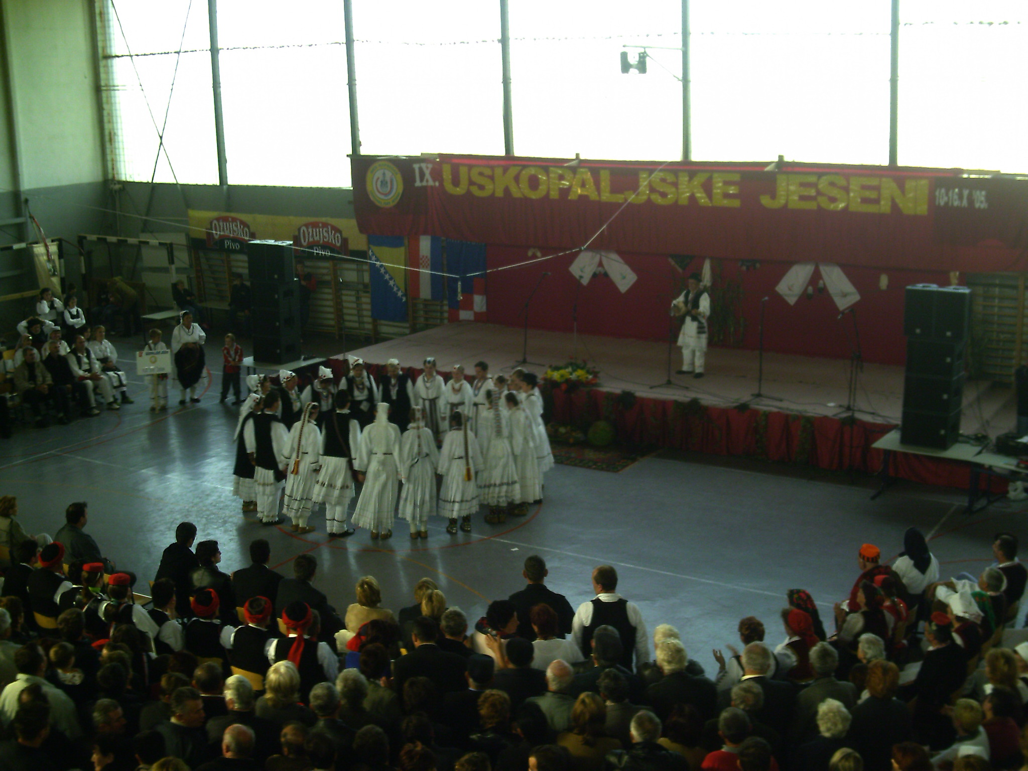 Herbstfest in Uskoplje